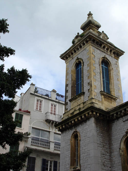 Gibraltar